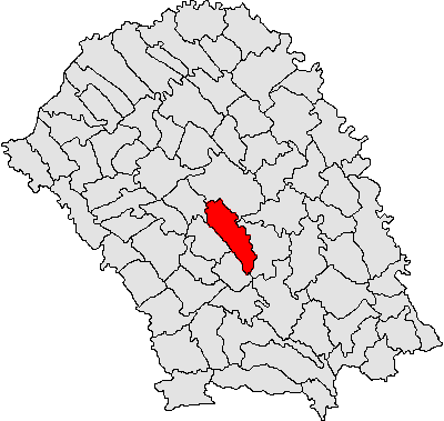 Categorie:Hărţi ale judeţului Botoşani